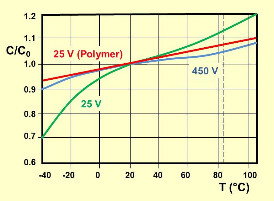 electrolytic capacitor, typical capacitance versus temperature